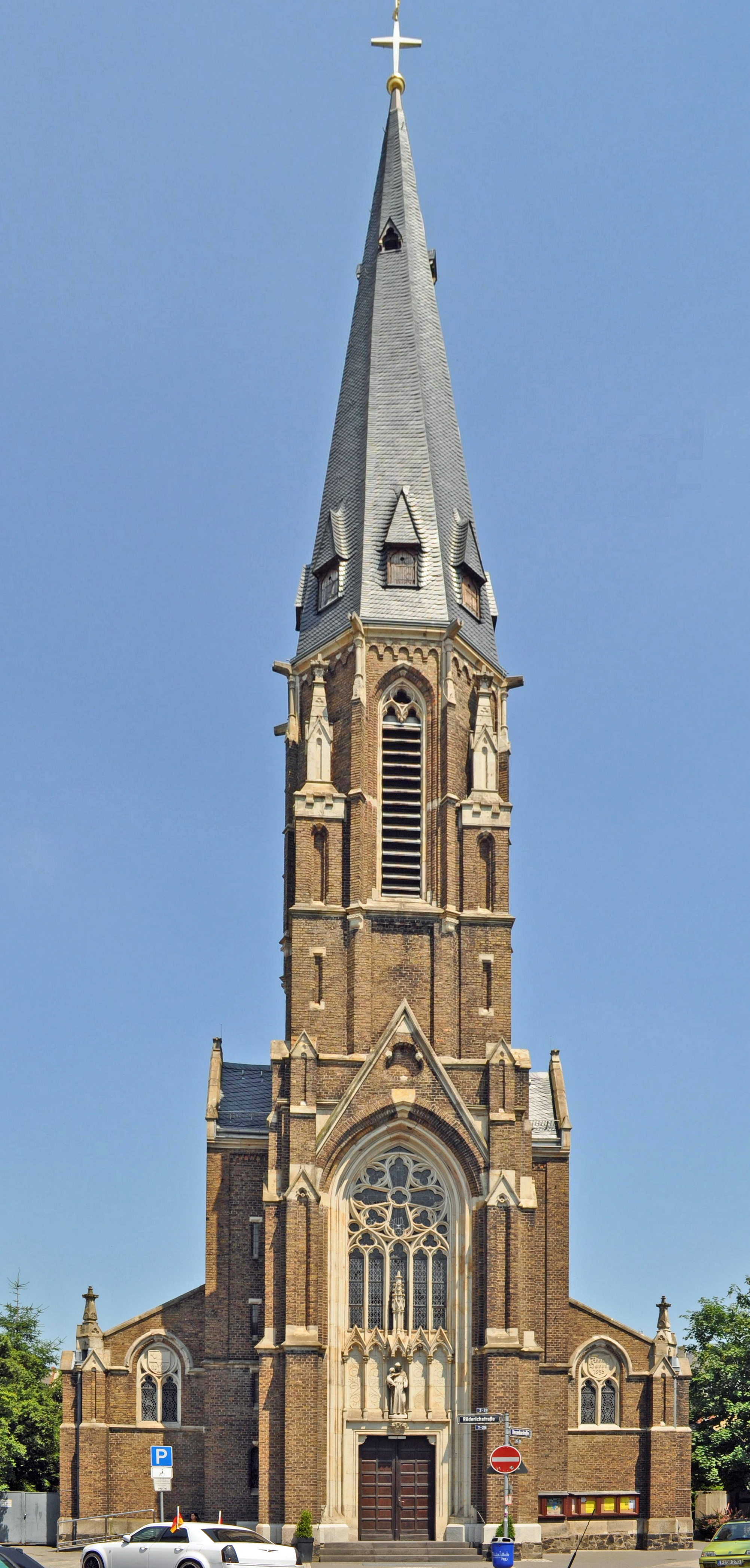 Antoniuskirche in Frankfurt am Main-Rödelheim